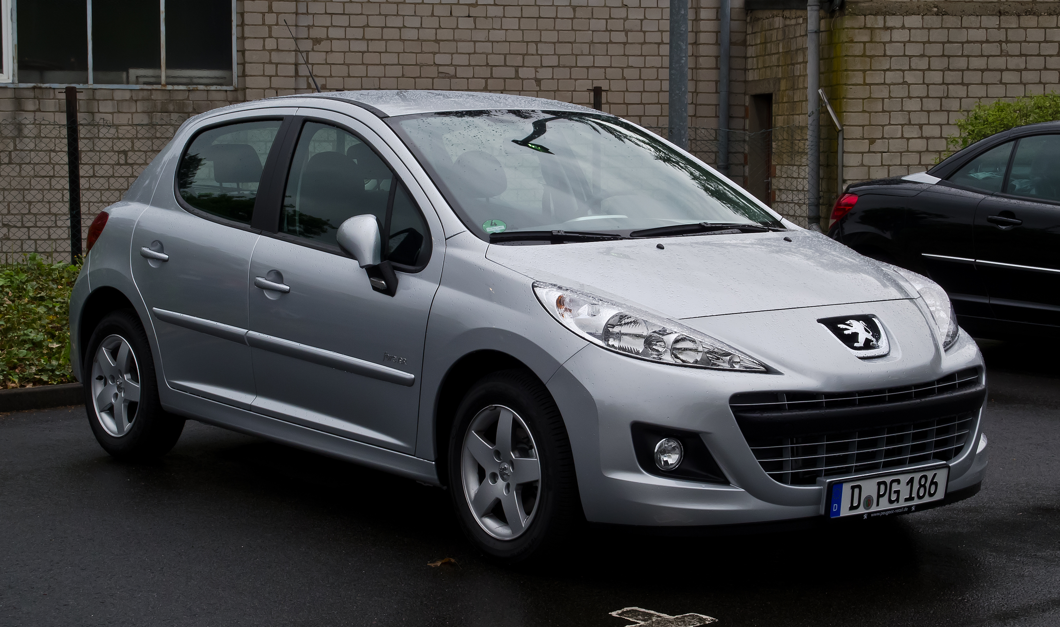 Peugeot 207 75 Forever (Facelift)